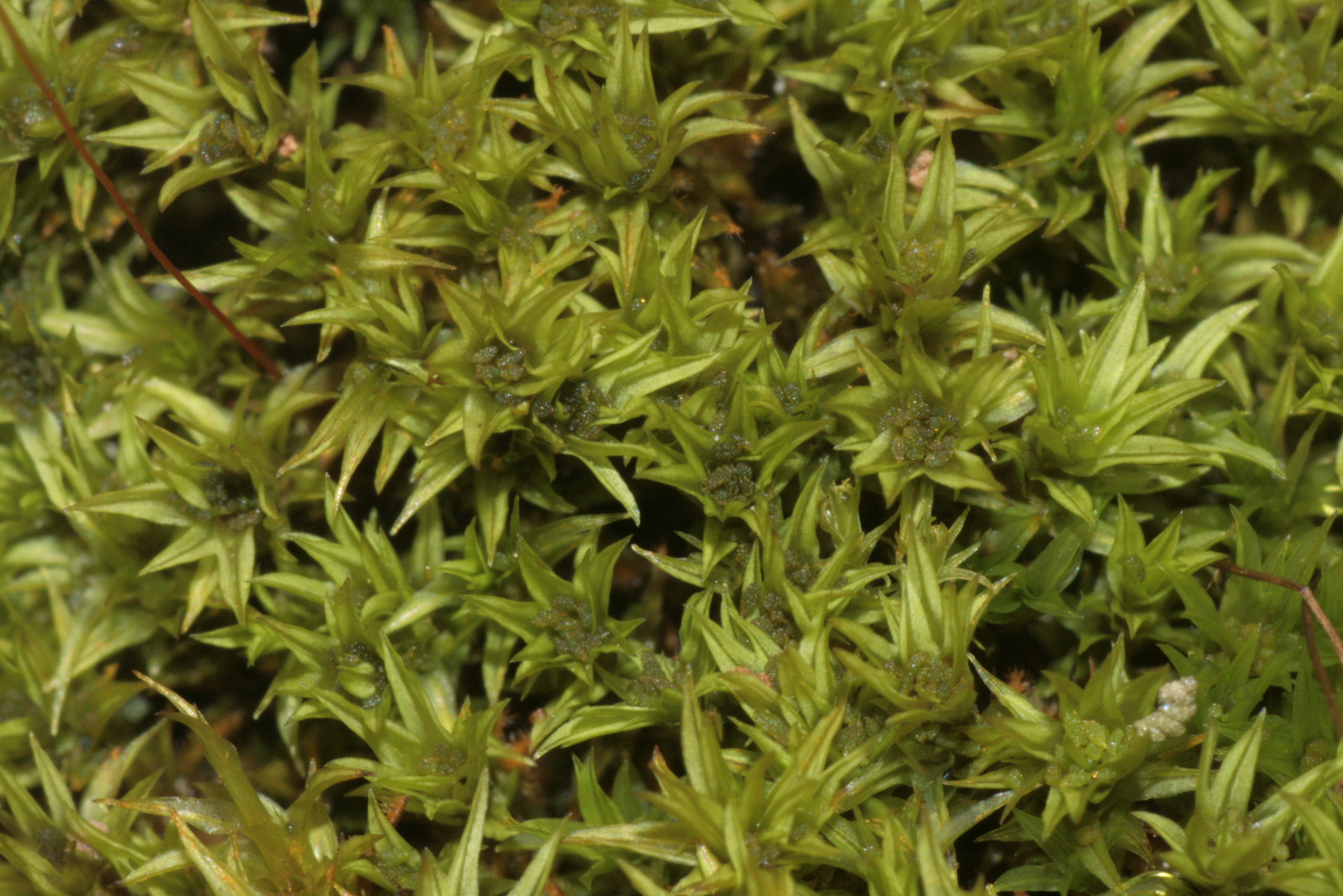 Barbula crocea, Umgebung Hollenstein an der Ybbs, Niederösterreich, Austria